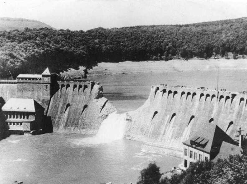 ADN-ZB 12.2.1964 Westdeutschland: Am 17. Mai 1943... lösten sich aus den nur 18 Meter hoch fliegenden Maschinen der Royal Air-Force vier Tonnen schwere Spezialbomben, klatschten in die Fluten und übersprangen die Sperren vor den Mauern. Es brachen der Damm der Möhnetalsperre in 77 Meter Länge und 20 Meter Tiefe und der Damm der Edertalsperre in 70 Meter Länge und 22 Meter Tiefe. Die dann zu Tal schießenden Wassermengen der insgesamt 304 Millionen Kubikmeter Wasser fassenden Talsperren richteten ungeheure Verwüstungen an und töteten im Gebiet der Möhne 1.200 Menschen, im Gebiet der Eder eine nicht mehr zu ermittelnde Zahl, aber mindestens 300. UBz.: Blick auf die zerstörte Staumauer der Edertalsperre. (16.5.1963)